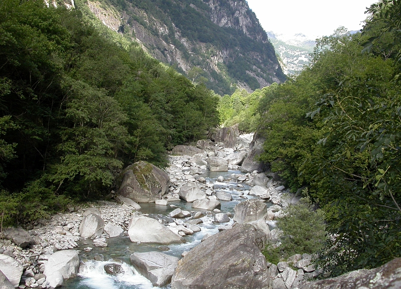 Valle Maggia, Ticino, Switzerland